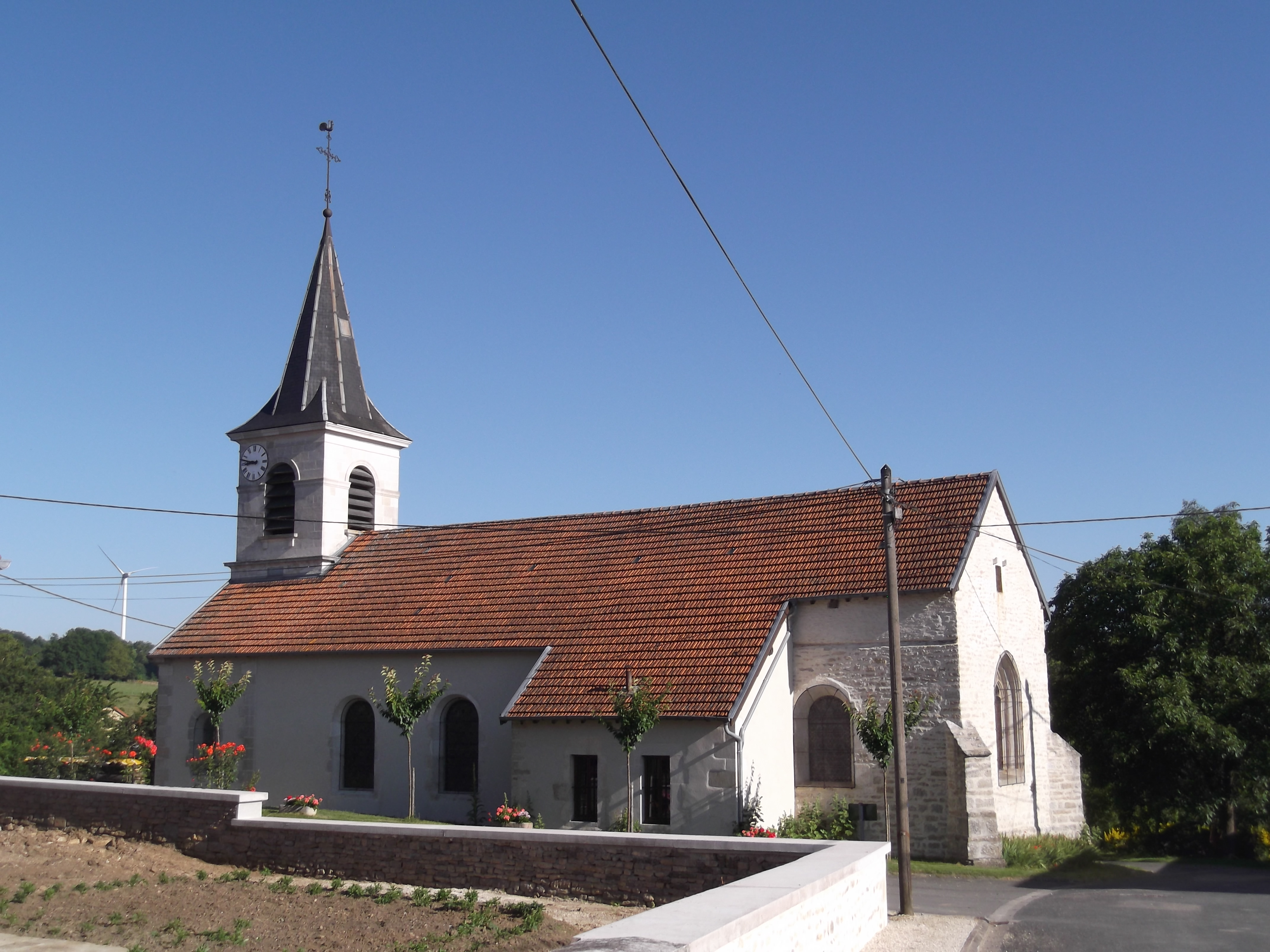 Eglise